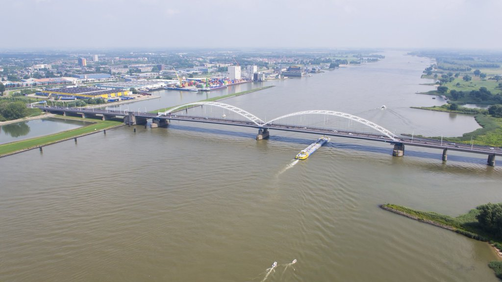 Merwedebrug bij Gorinchem